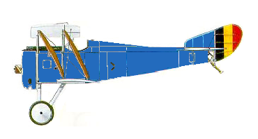 Hanriot HD 1 chasseur monoplace de la Première Guerre mondiale